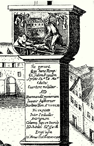 Schandsäule für den Führer der lutherischen Bewegung auf dem Marktplatz in Aachen; aufgestellt 1616, im Jahre 1792 bei der Ankunft der Franzosen umgestürzt und zerschlagen. Übersetzung der Inschrift: "So kommen diejenigen um, die es anstreben, dieses Gemeinwesen und diesen königlichen Sitz umzustürzen, indem sie die Verordnungen der Heiligen Kaiserlichen Majestät verachtet haben. Zur verdammenswerten Erinnerung an Johann Kalckberner, den Anführer im letzten Tumult, der hier im Jahre 1611 zwischen den Feinden heraufbeschworen worden war, wurde angeordnet, diese Säule gemäß dem Erlaß der Herren Abgesandten der Heiligen Kaiserlichen Majestät zu errichten am 3. Tag vor den Nonen des Dezembers 1616."